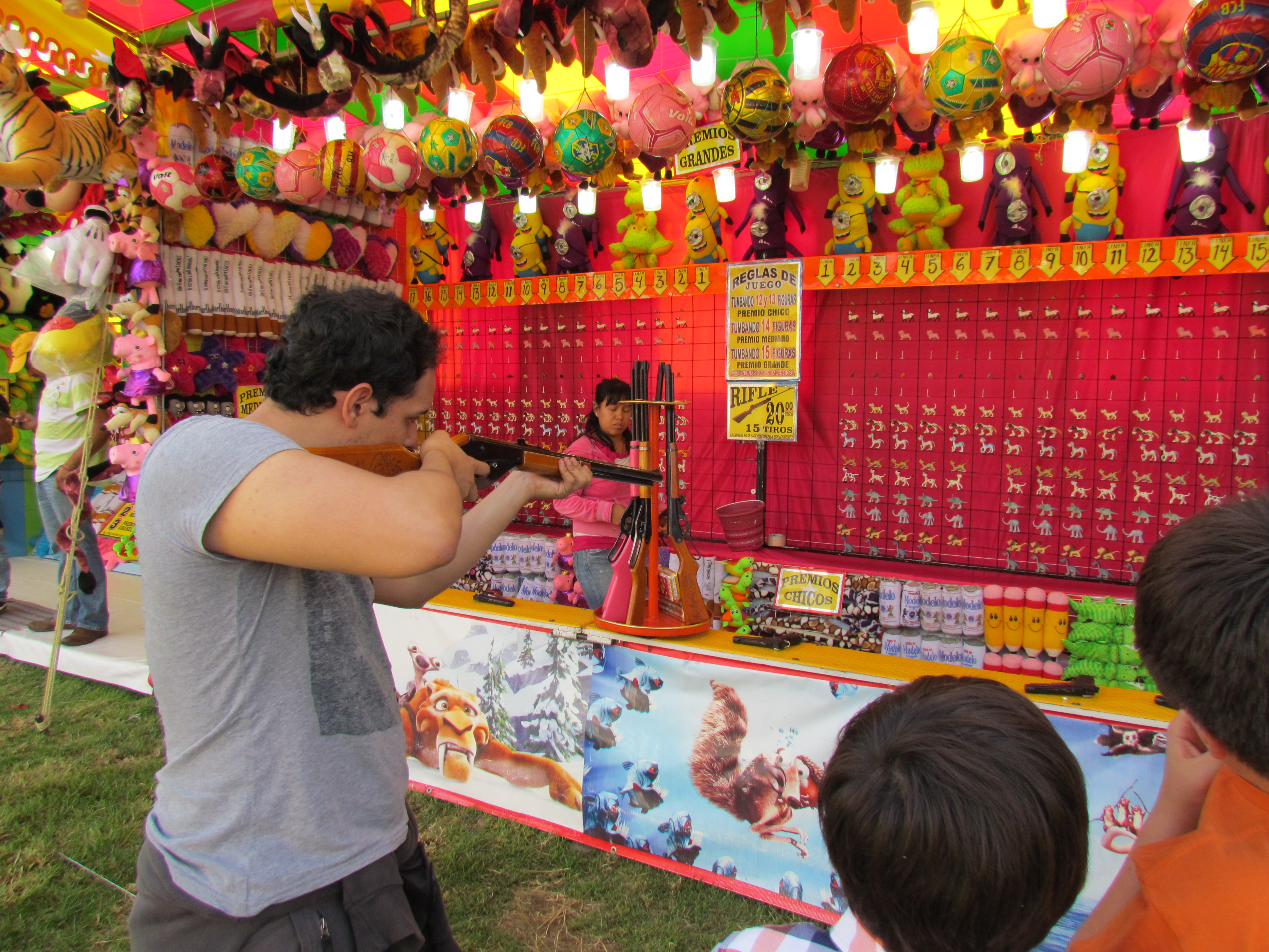 Juegos de destreza y tiro en la feria del mole 2014 (#2)